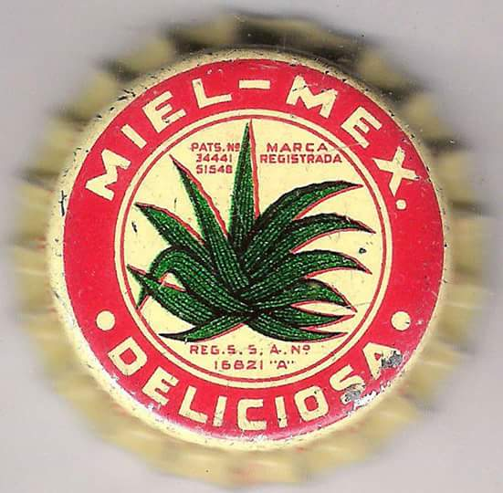 Corcholata mexicana de Pulque embotellado Miel-Mex